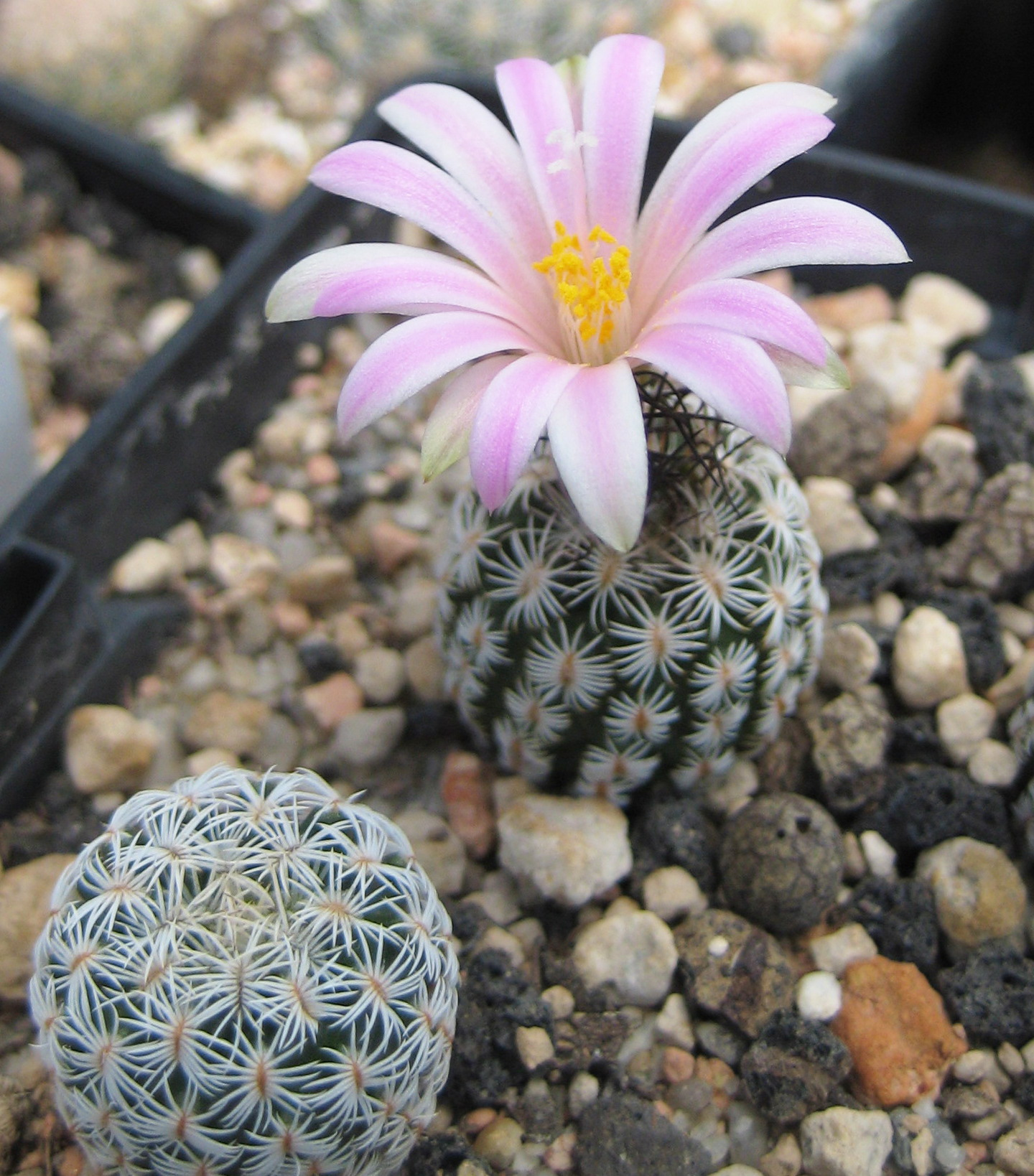 Turbinicarpus pseudomacrochele subsp. lausseri